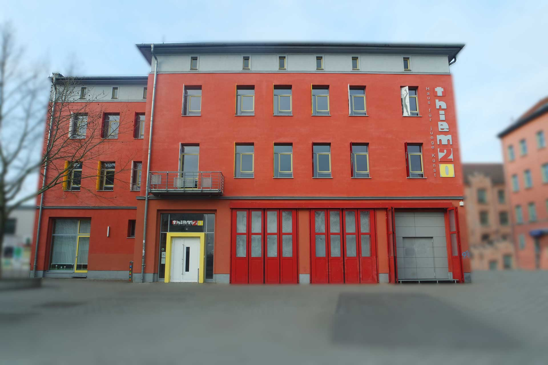 Thiem20